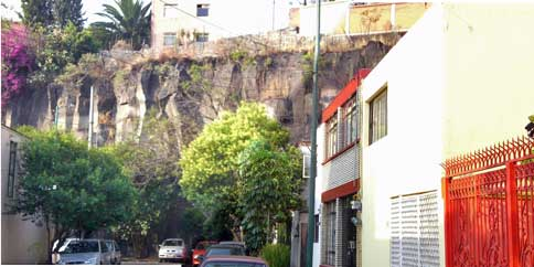 Construcciones al pié y sobre la lava del volcán Xitle en la colonia Romero de Terreros